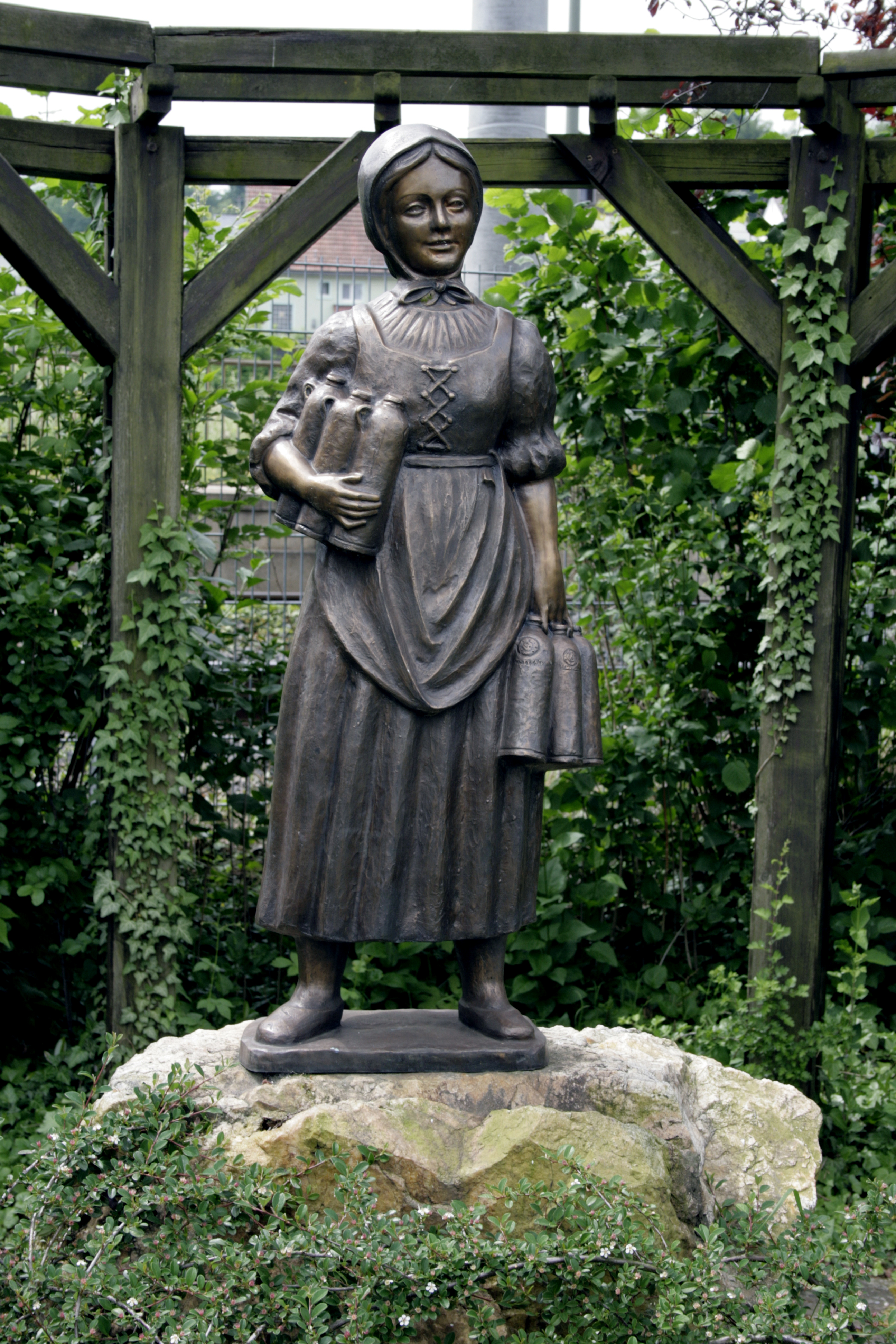 Denkmal "Brunnenmädchen" in Niederselters, Deutschland